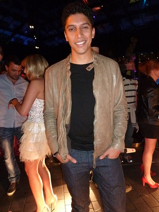 Andreas Bourani auf der "Music meets Media" in Berlin